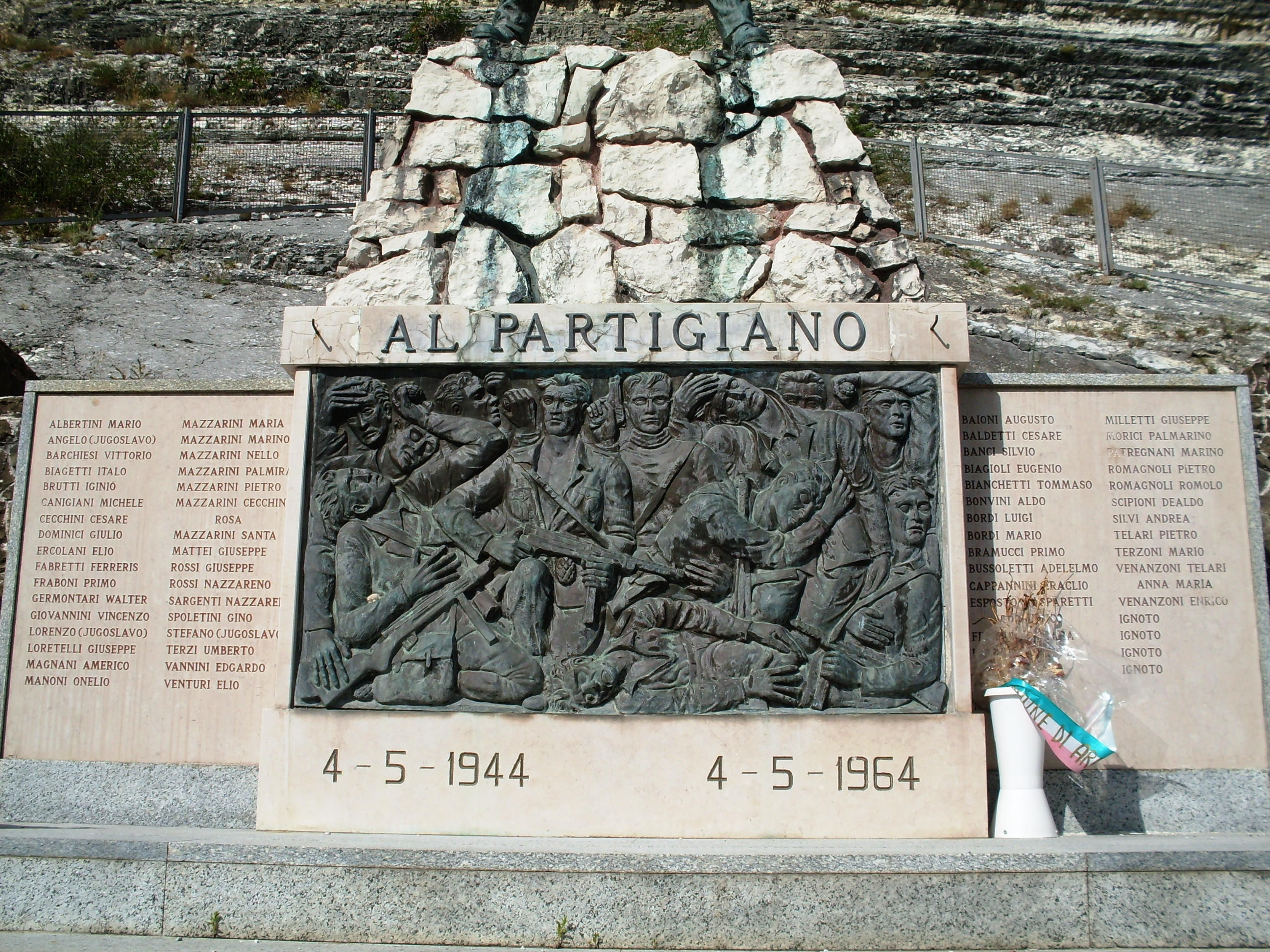 Arcevia partigiani caduti 1944